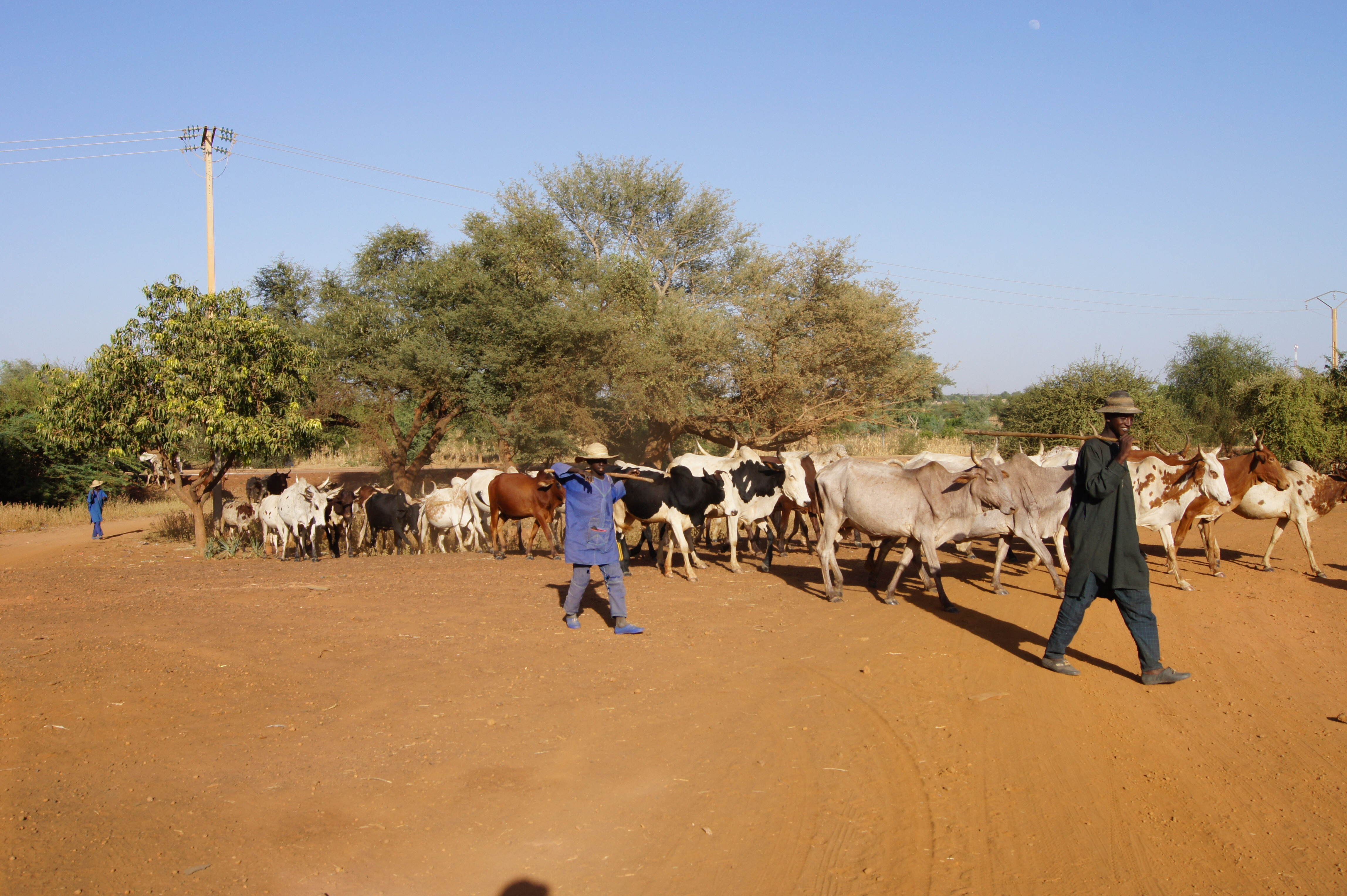 Bergers nigériens et leur troupeau de zébus, aux portes de Niamey This is an image of "African people at work" from Niger